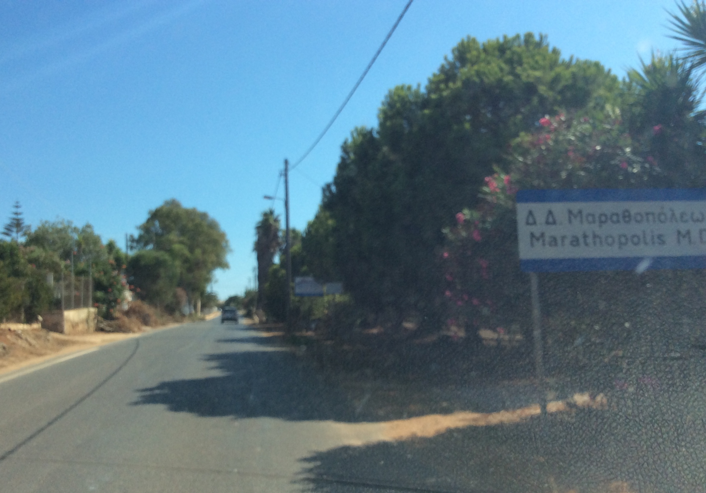 Μαραθόπολη. Παραλιακός δρόμος Φιλιατρών-Μαράθου